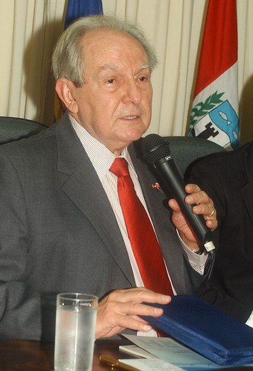 Bernardo Cabral, Brazilian politician.